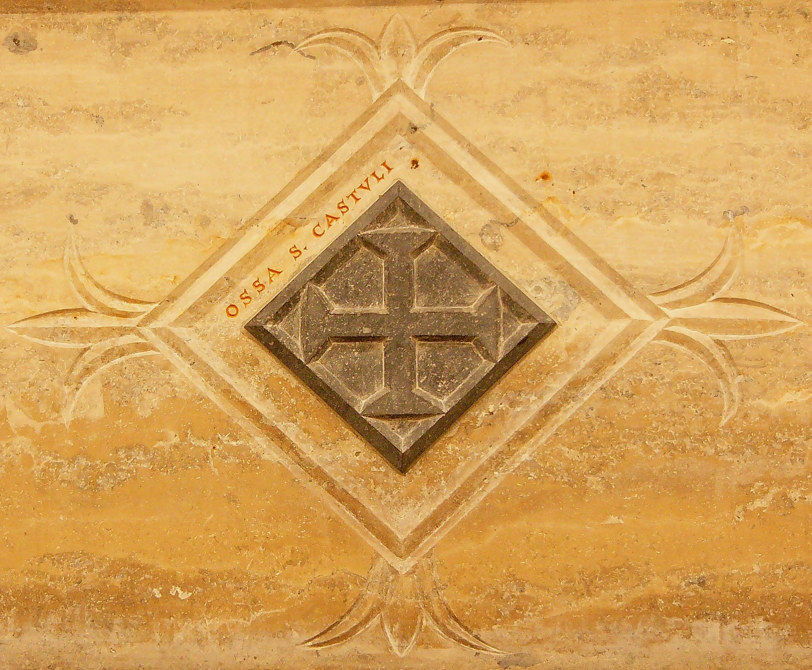 Reliquiengrab mit Gebeinen des Hl. Kastulus im Volksaltar der Stiftsbasilika St. Martin in Landshut.